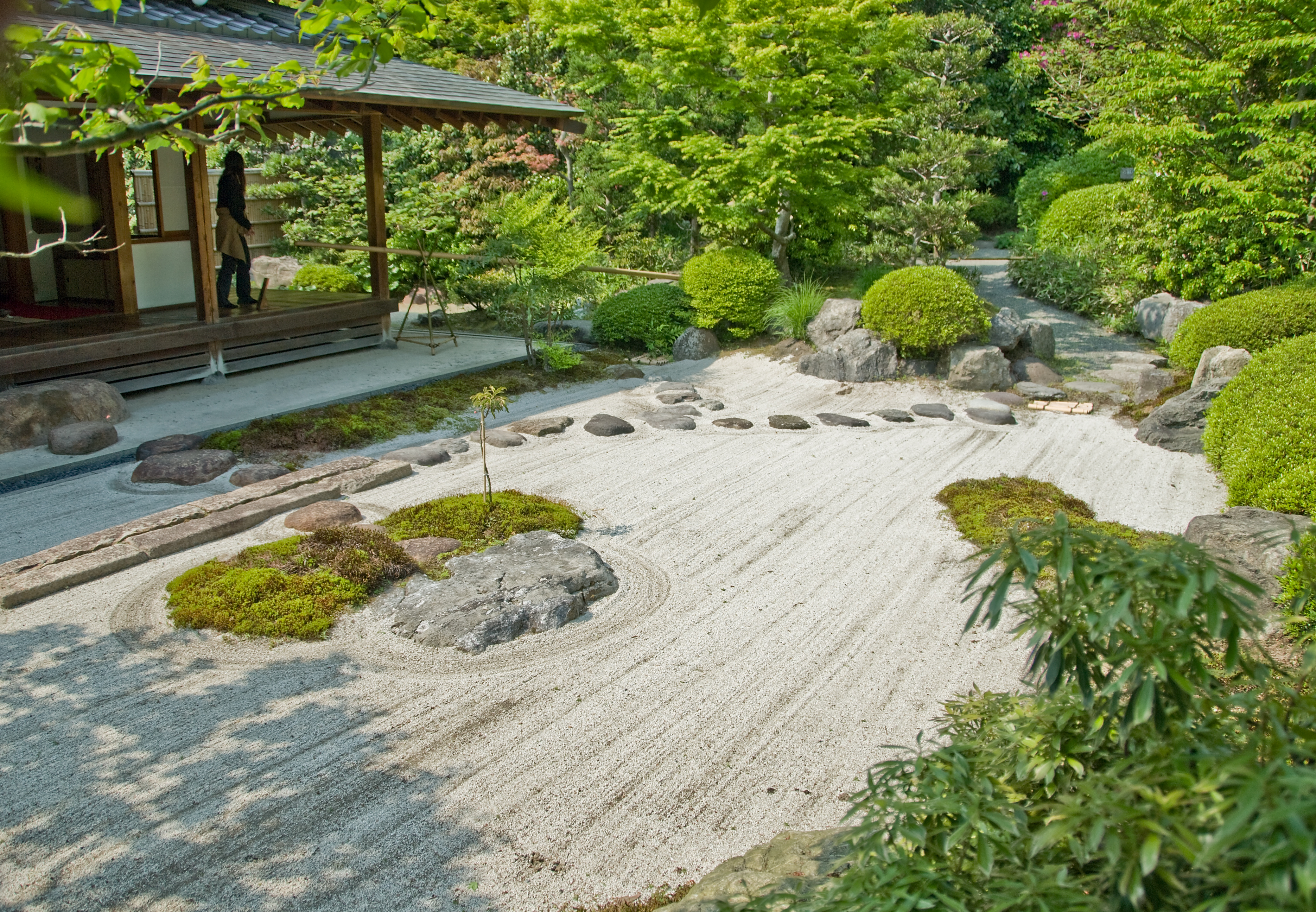 Jomyo-ji, Kamakura. The Sand Garden